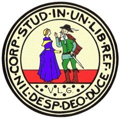 Wapen van Lanx zoals getekend door Daniel van der Ree voor Corporal Pursuit, als onderdeel van de almanak 1995/1996